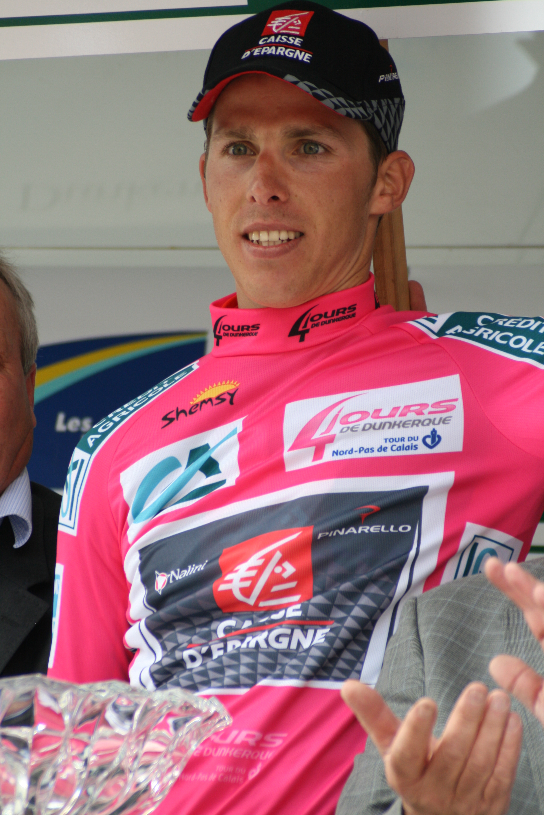 Rui Costa sur le podium des Quatre jours de Dunkerque 2009